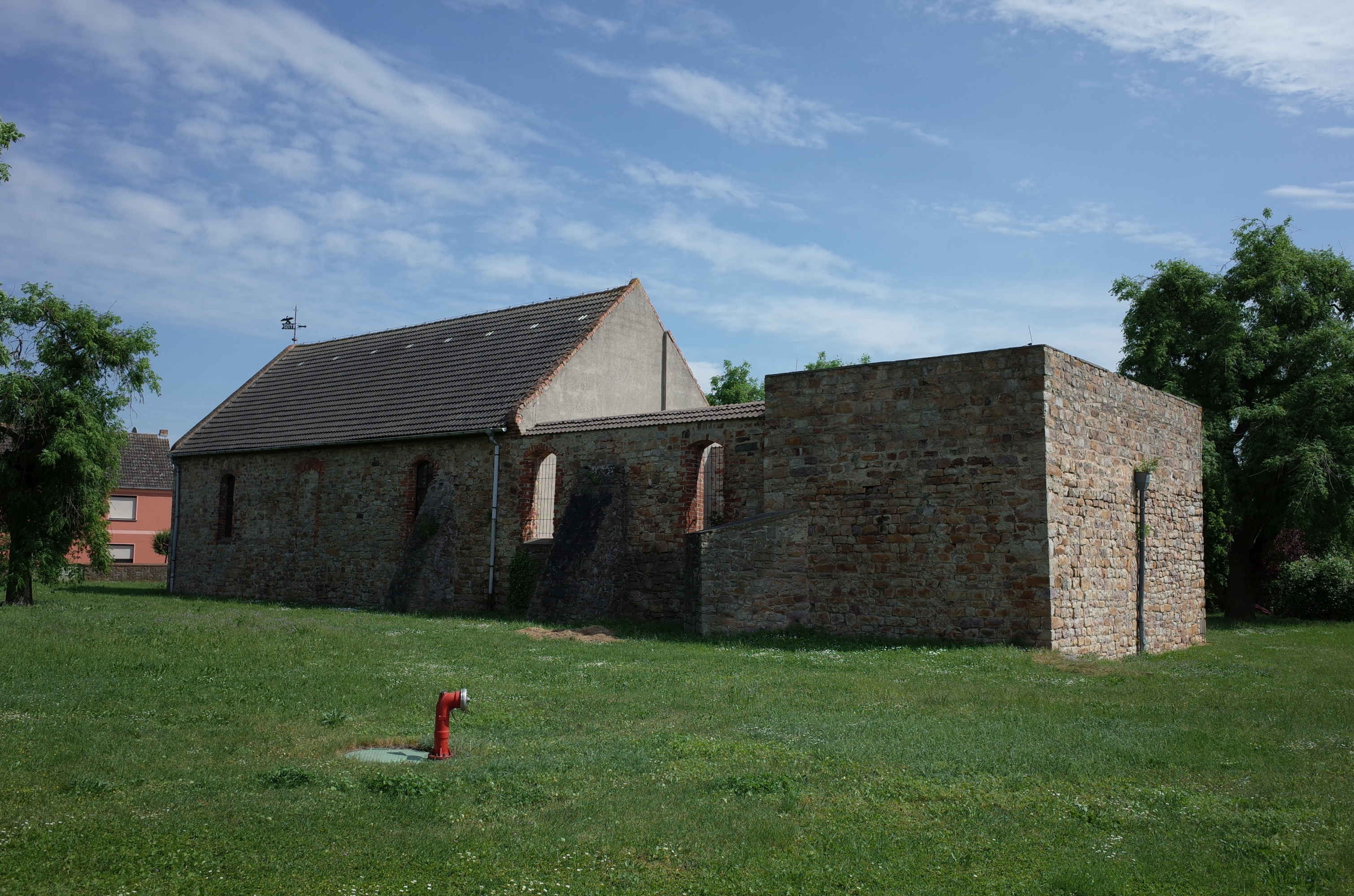 Gommern, Kirche im Ortsteil Ladeburg.